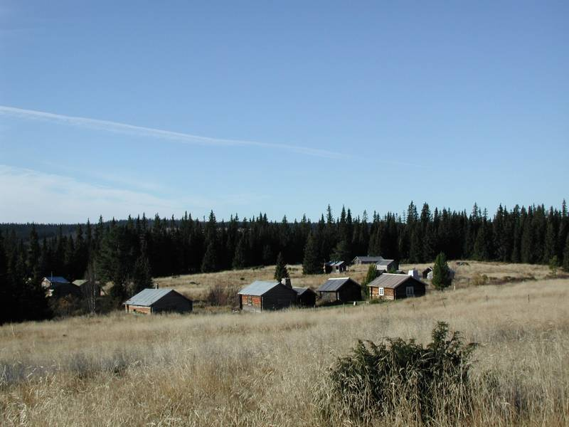 Die Alm Oviks-Svedjebodarna am Fäbodvägen in Jämtland, Schweden; the mountain pasture Oviks-Svedjebodarna along the Fäbodvägen in Jämtland, Sweden